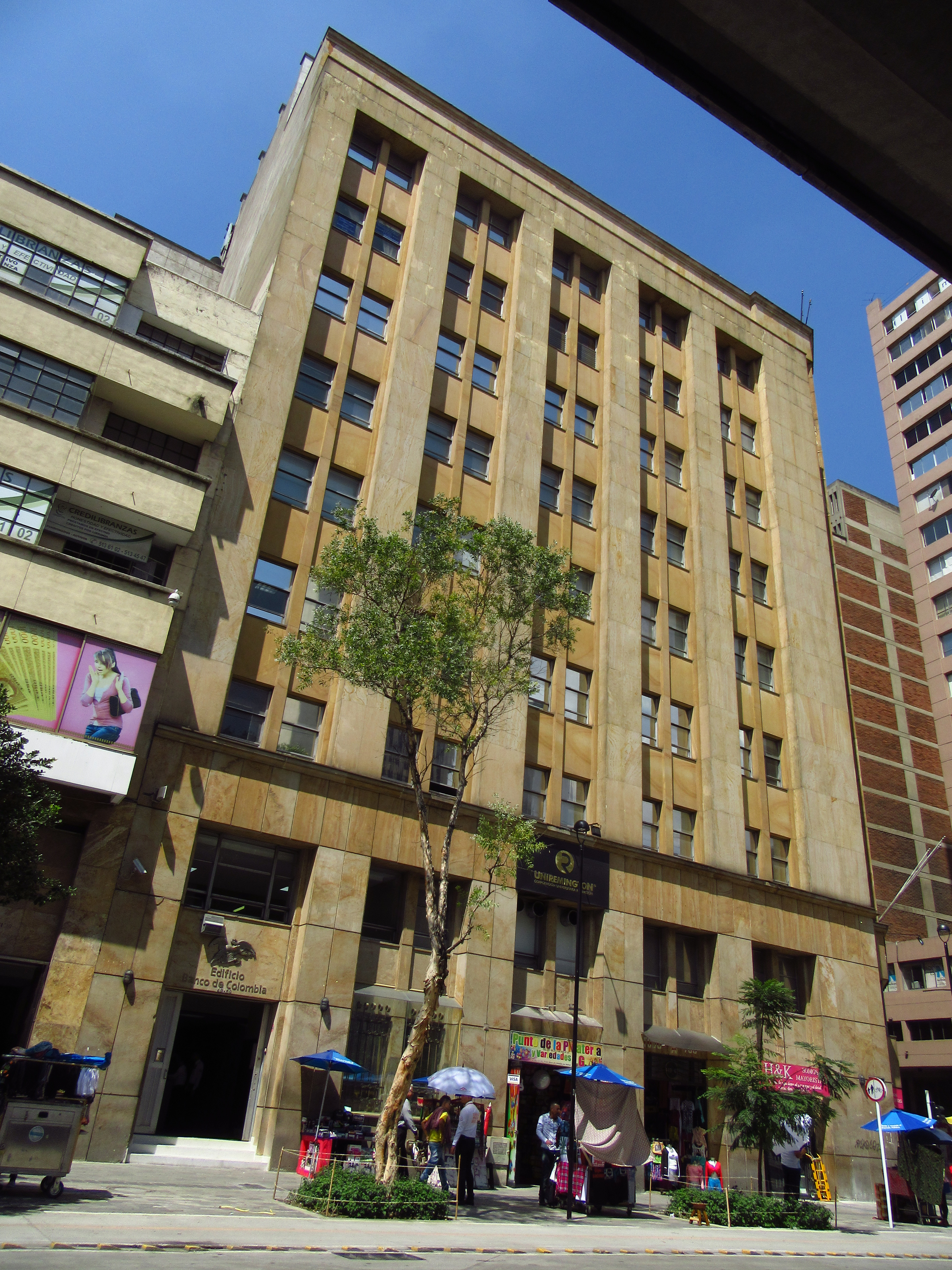 Sede del Bando de Colombia (1950). Está ubicado en la esquina de la calle Colombia con la carrera Bolívar (esquina suroccidental del Parque de Berrío) en el Centro de Medellín. Diseñado por por el arquitecto austriaco Frederick Blodek para la empresa Arquitectura y Construcciones. Es un caso emblemático de la arquitectura bancaria de laciudad. Presenta un ochave que lo relaciona relacionado visual y espacialmente con el parque. Se encuentra en la Cra. 51 #49-31. Fuente:La arquitectura bancaria de Medellín y los edificios de Bancolombia, por Luis Fernando González Escobar en